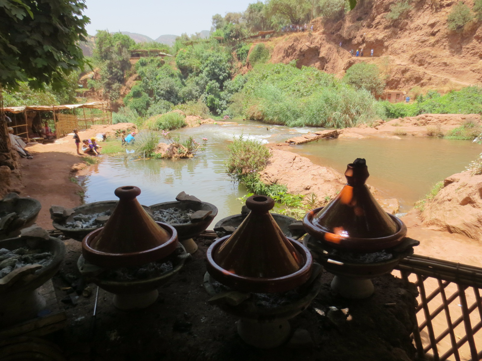 Ouzoud Falls